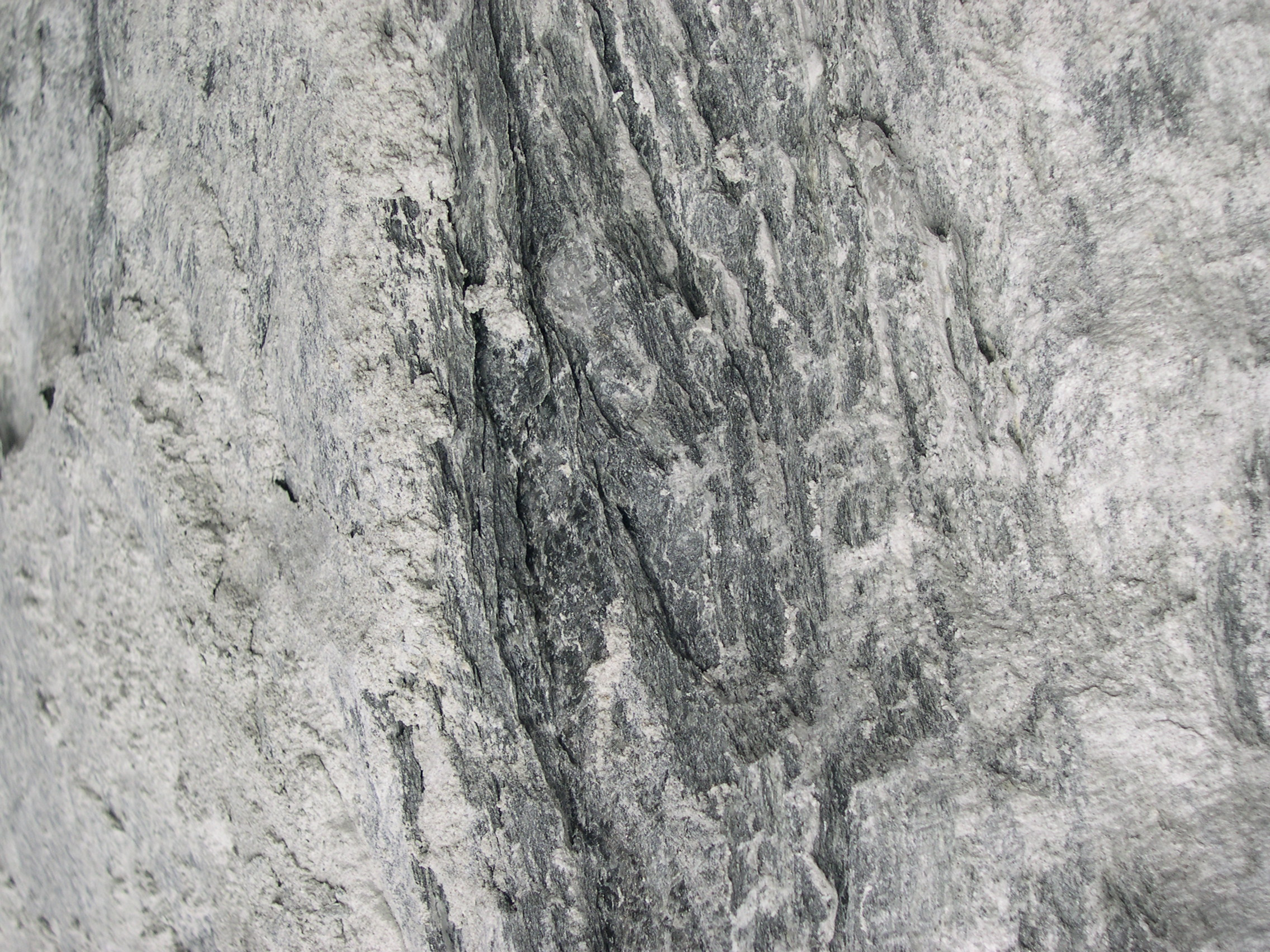 Soapstone from NunnaUuni